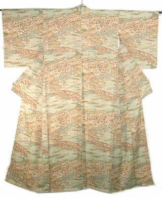 Eba Komon